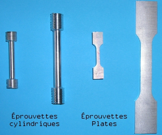 Eprouvettes de traction en alliage d'aluminium.